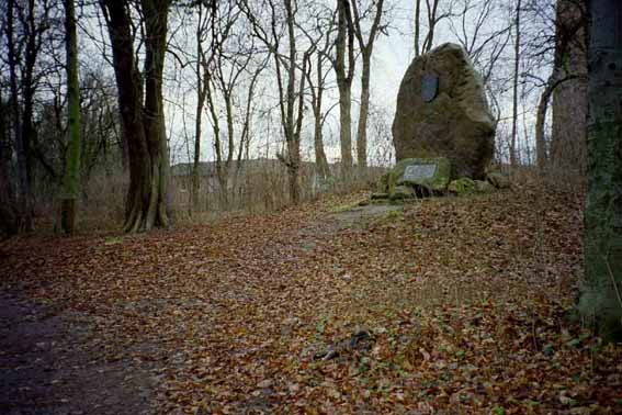 Gedenkstein an der Stelle der früheren Pfalz Grona bei Göttingen